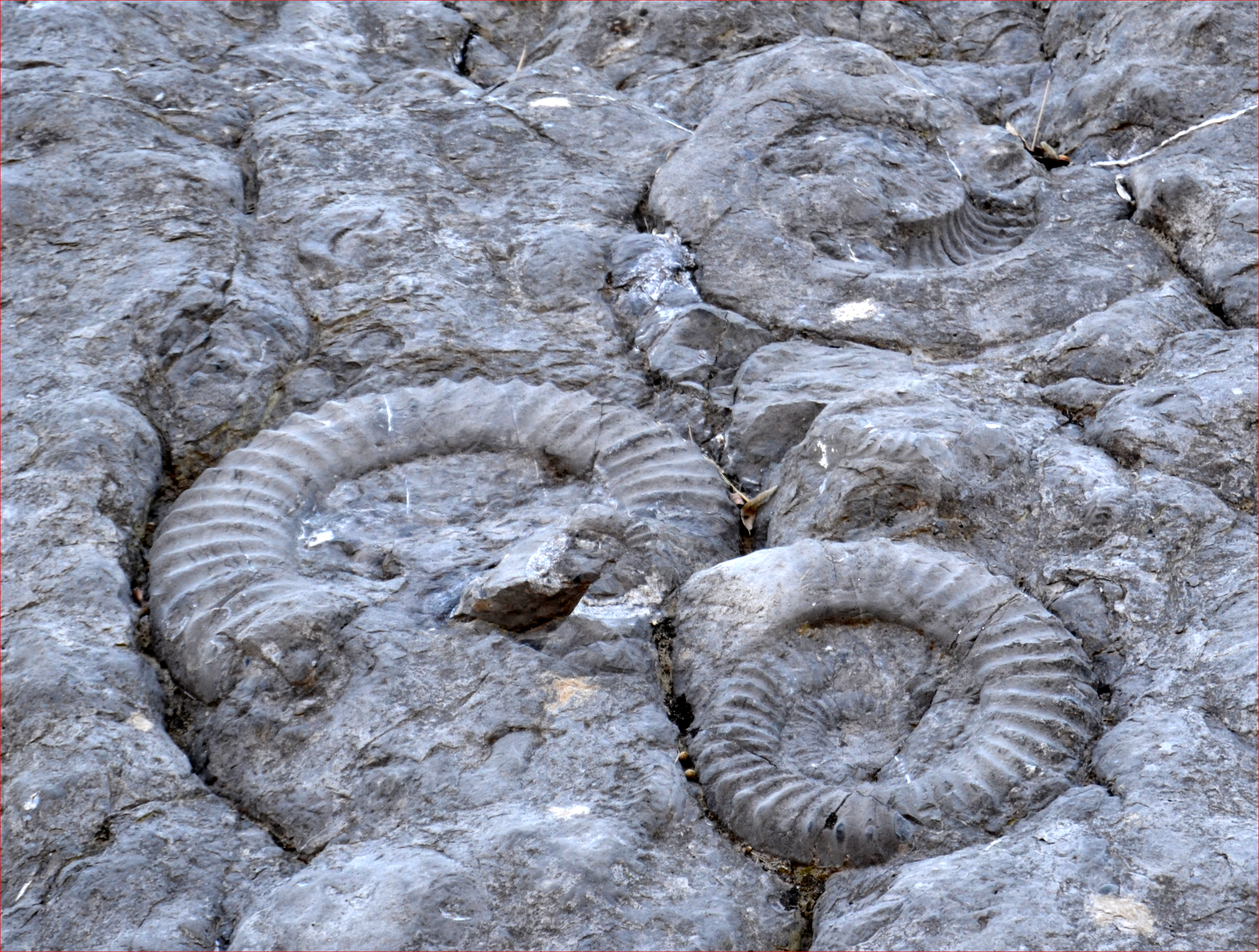 Amonitas (Coroniceras multicostatum) dins la region de Dinha.